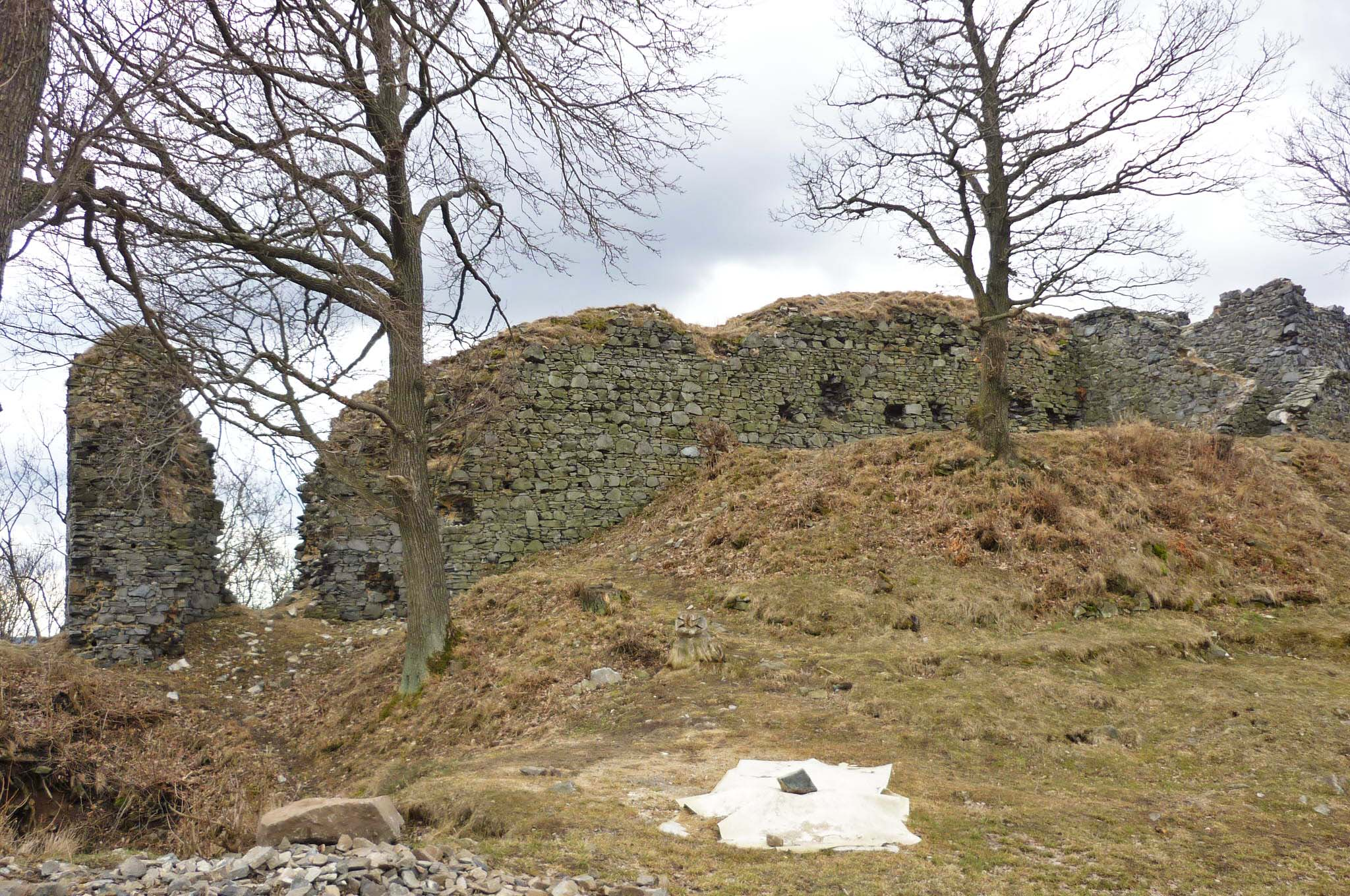 Burgruine Blankenstein (Blansko) bei Aussig (Ústí nad Labem)